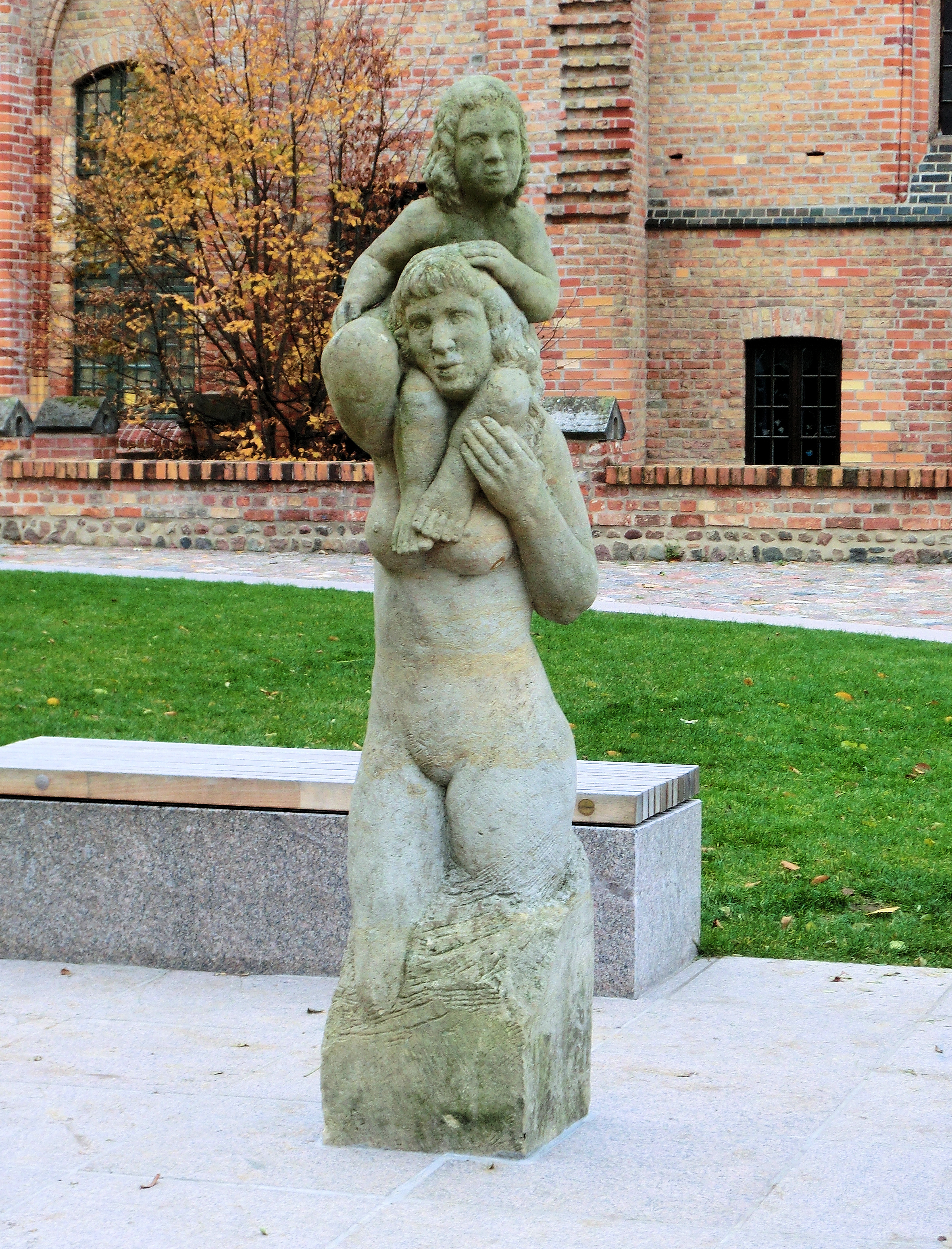 lebensgroße Skulptur „Mutter und Kind“ aus Cottaer Sandstein von Detlef Herrmann auf dem Innenhof des Hauses der Musik in Rostock